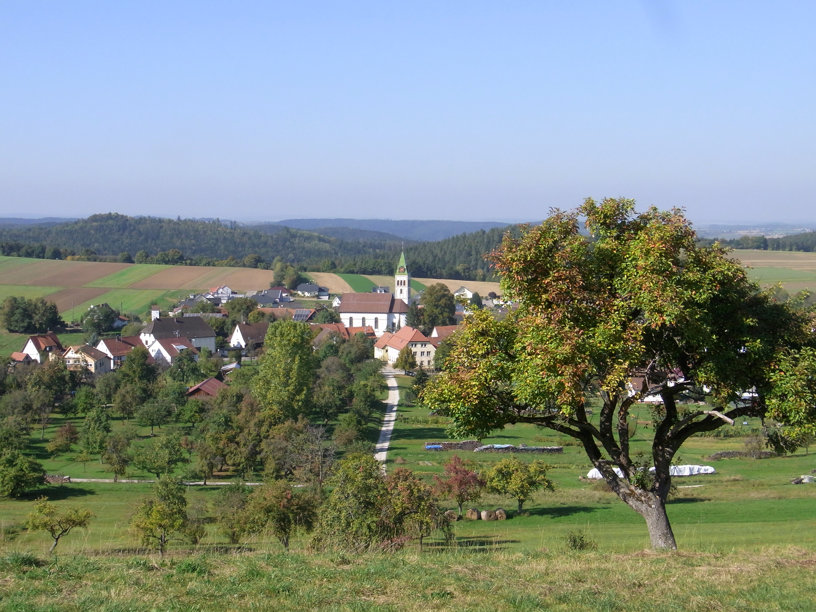 Erlaheim: St. Sylvester